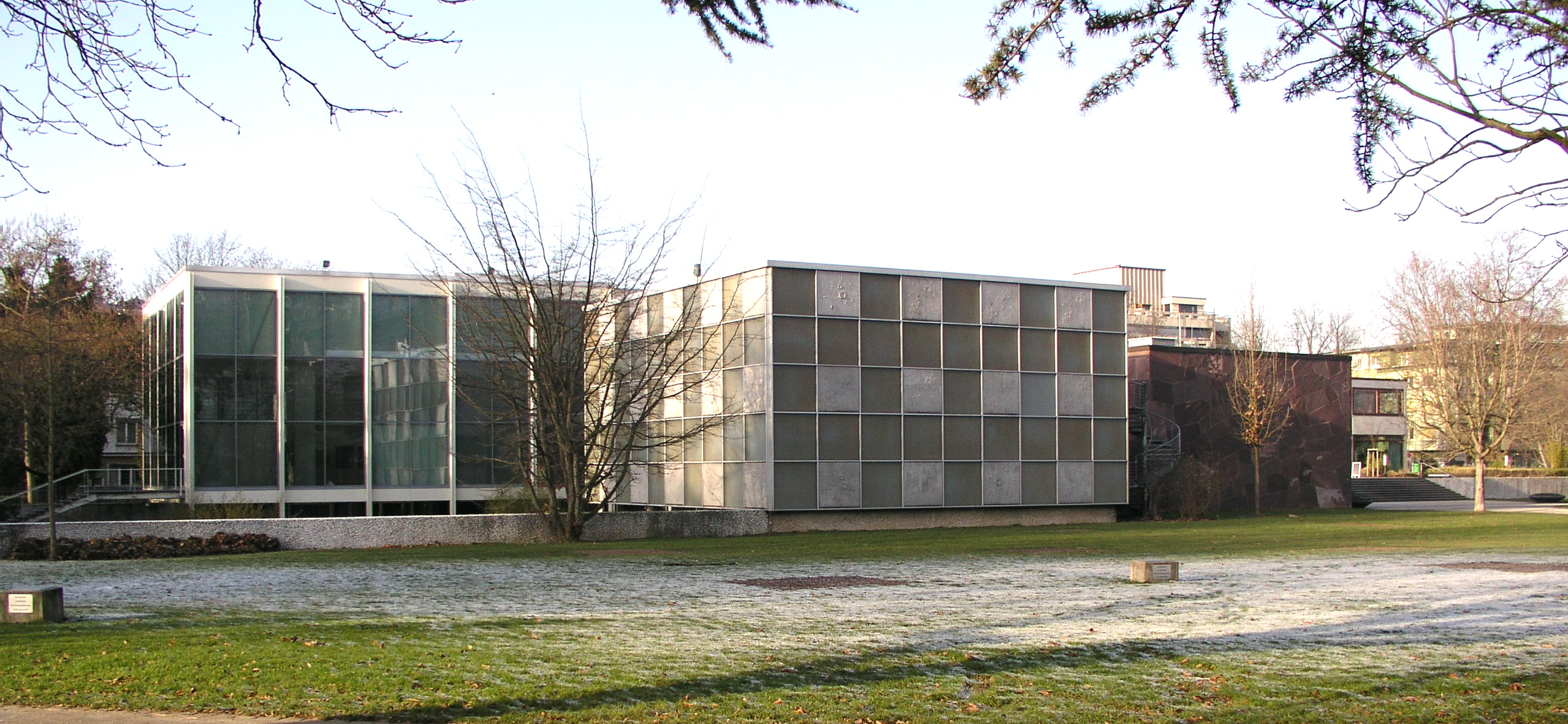 Das Reuchlinhaus, im Stadtgarten gelegen, wurde zwischen 1957 und 1961 erbaut. Es gehört zu den überregional beachteten Leistungen der Nachkriegsmoderne. Von Manfred Lehmbruck, Sohn des Bildhauers Wilhelm Lehmbruck, als Kulturzentrum Pforzheims entworfen, vereinigt der Bau, inspiriert von Le Corbusier und Mies van der Rohe, Elemente des internationalen Stils.